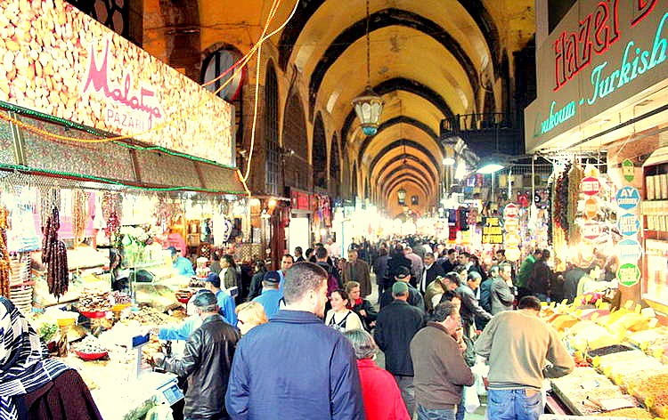 Mısır Çarşısı, Eminönü, Istanbul, Turkey